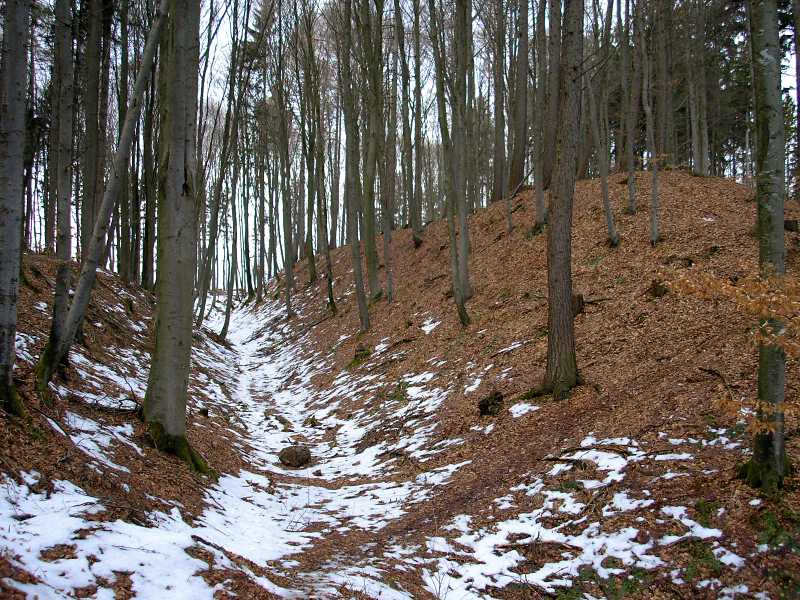 Haldenburg bei Schwabmünchen. Der innere Wall der Vorburg nach Norden. Eigene Aufnahme, Feb. 2006